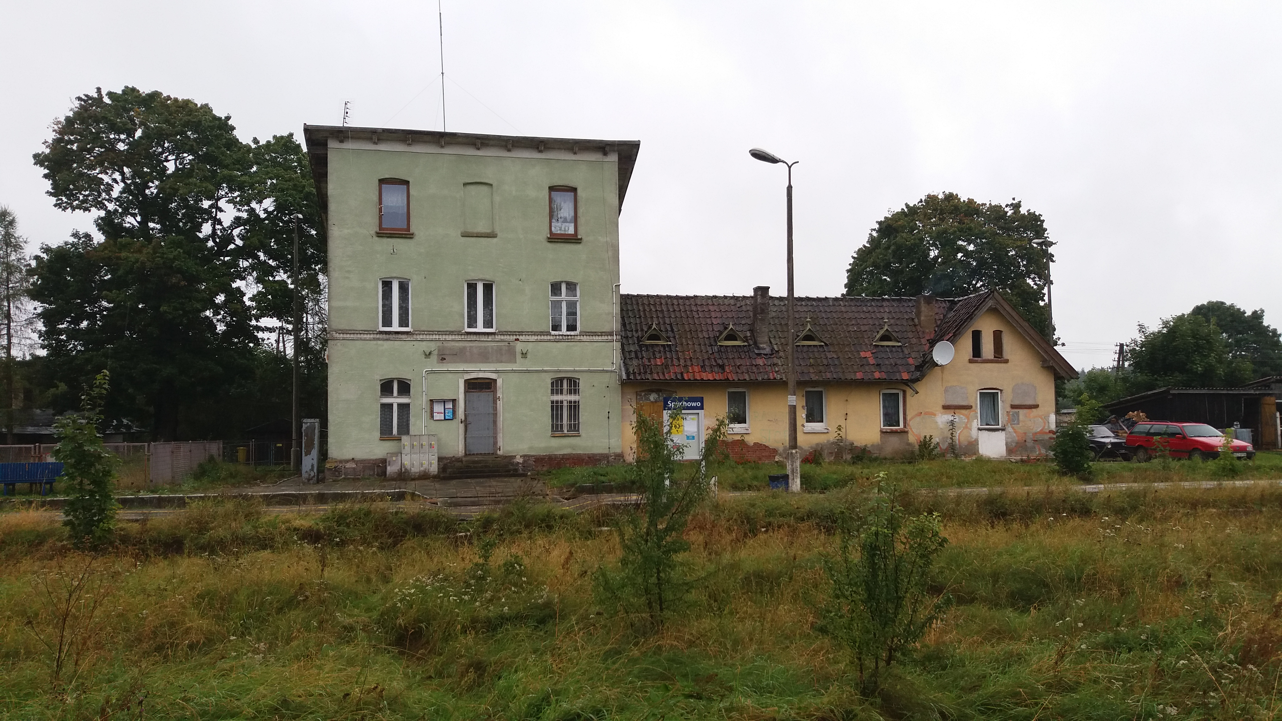 2017. Dworzec kolejowy